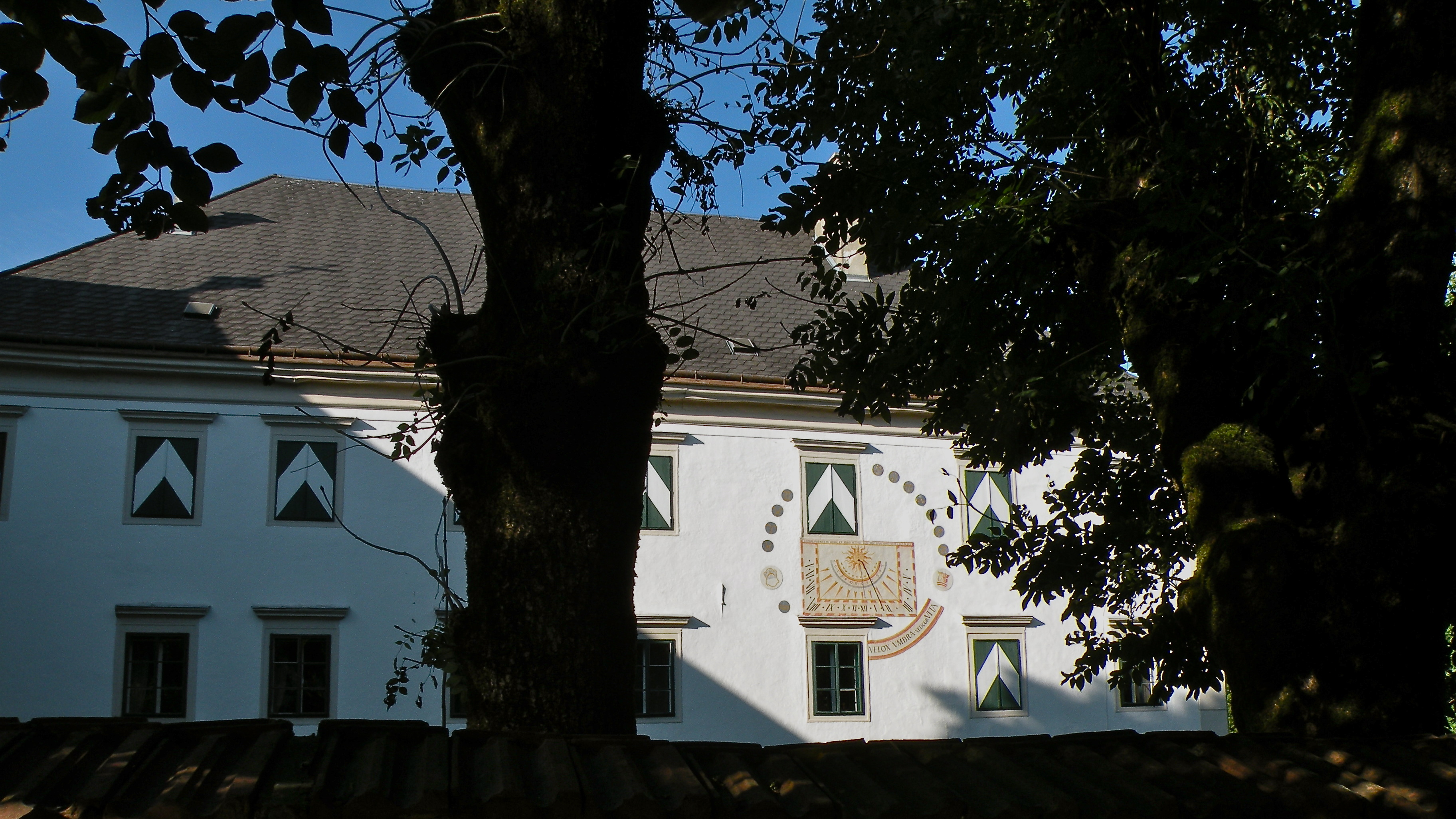 Schloss Marbach in Ried in der Riedmark im Bezirk Perg in Oberösterreich